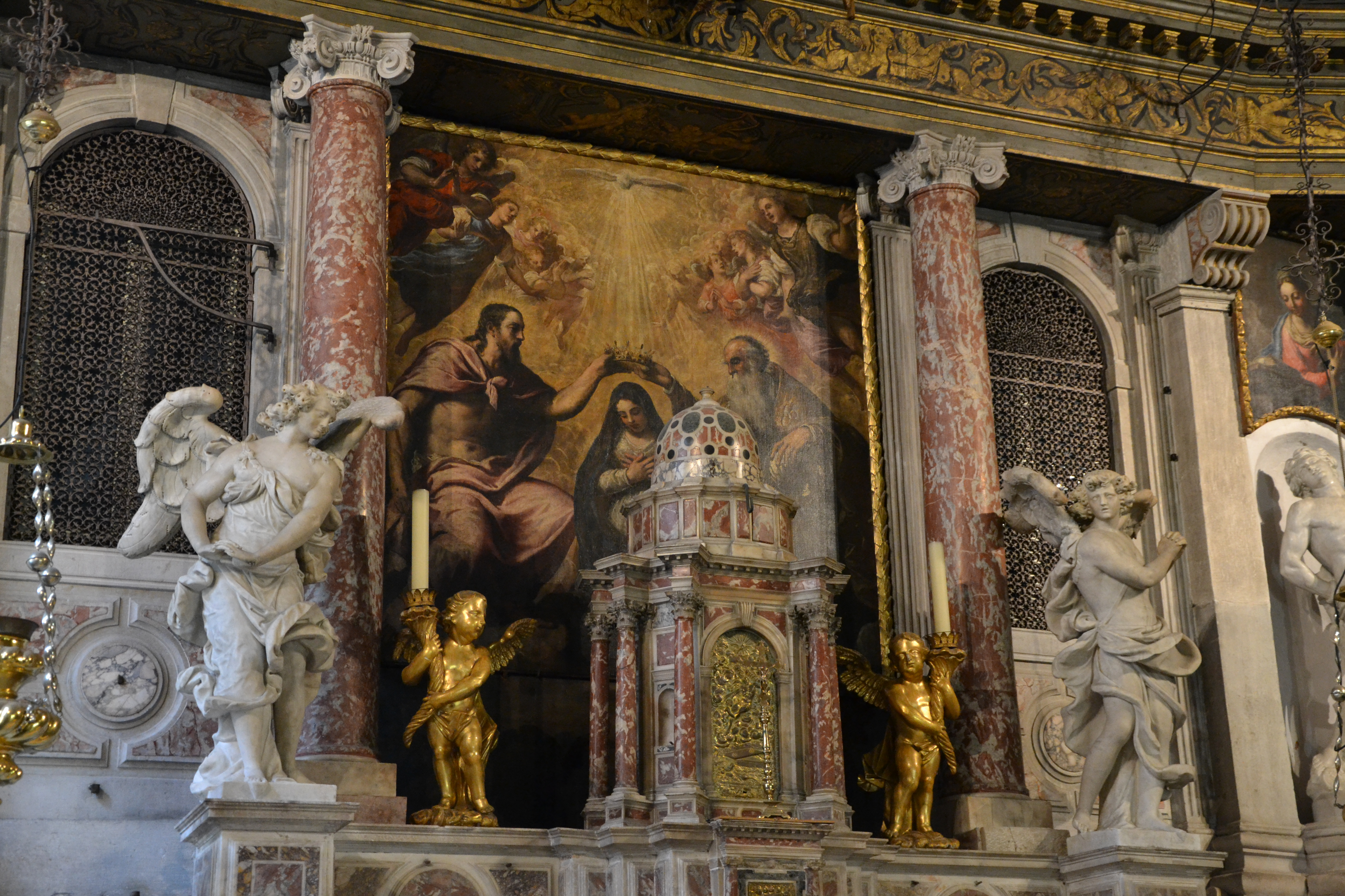 Incoronazione di Maria, Damiano Mazza,Santa Maria dei Derelitti (Venezia), vulgo dell’Ospedaletto